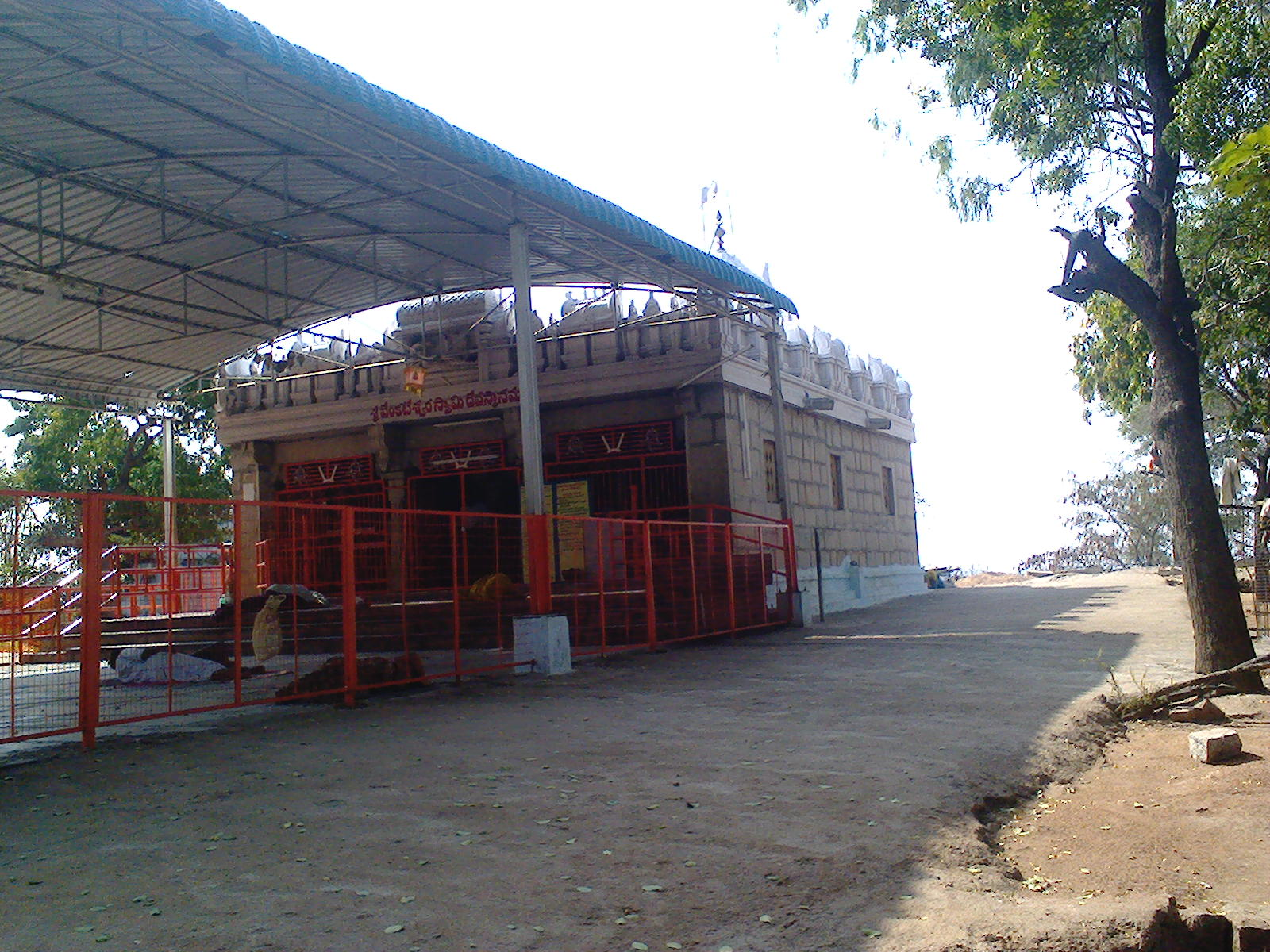 శ్రీపాగుంట వేంకటేశ్వరస్వామి దేవాలయం (ఎడమ నుండి)